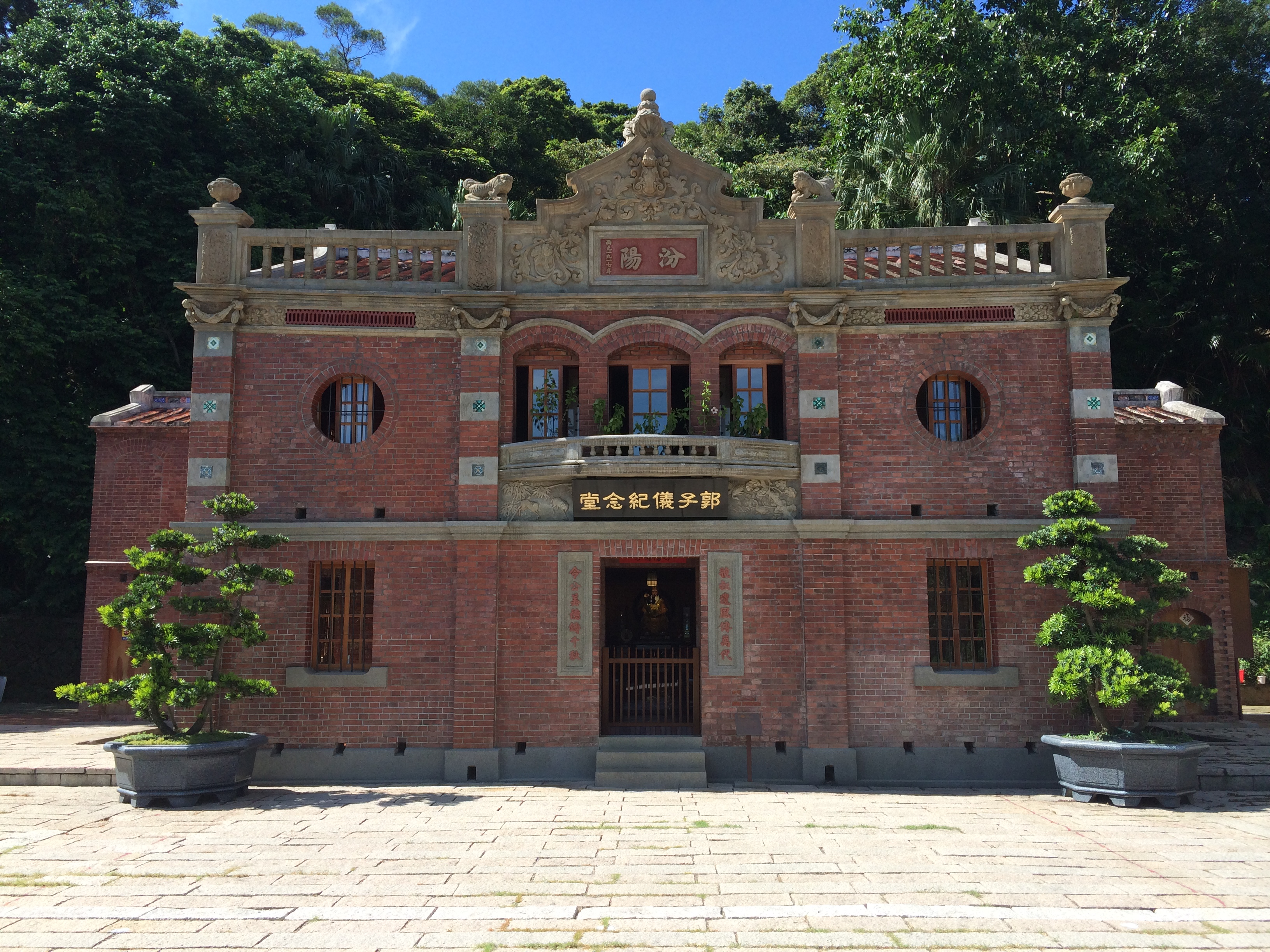 臺北市市定古蹟內湖郭氏古宅（郭子儀紀念堂）